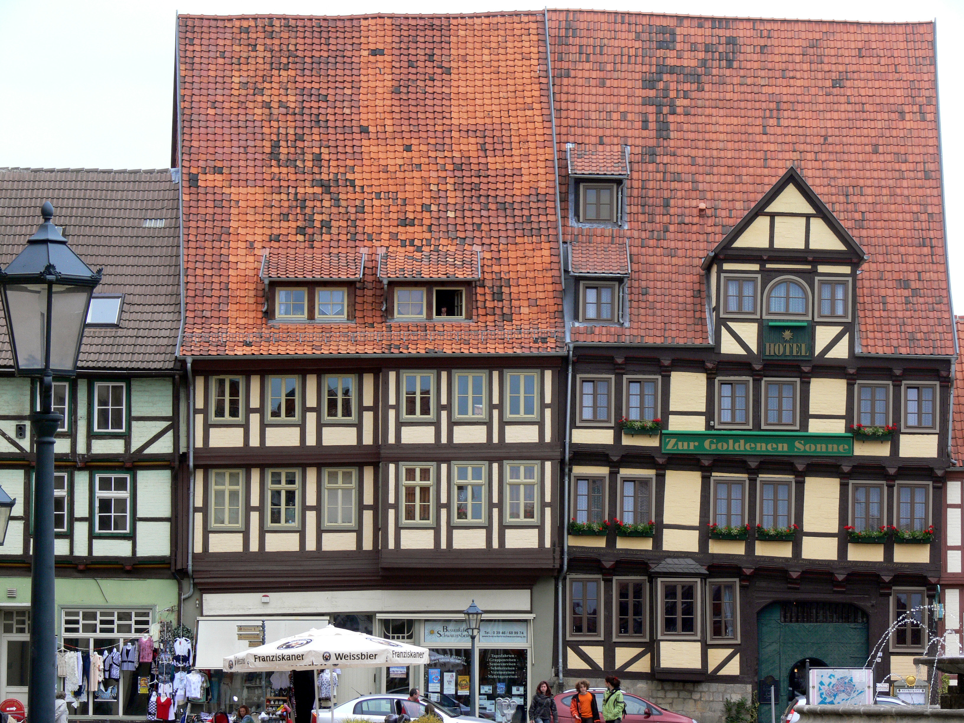 Haus Steinweg 11 = Haus zur Goldenen Sonne